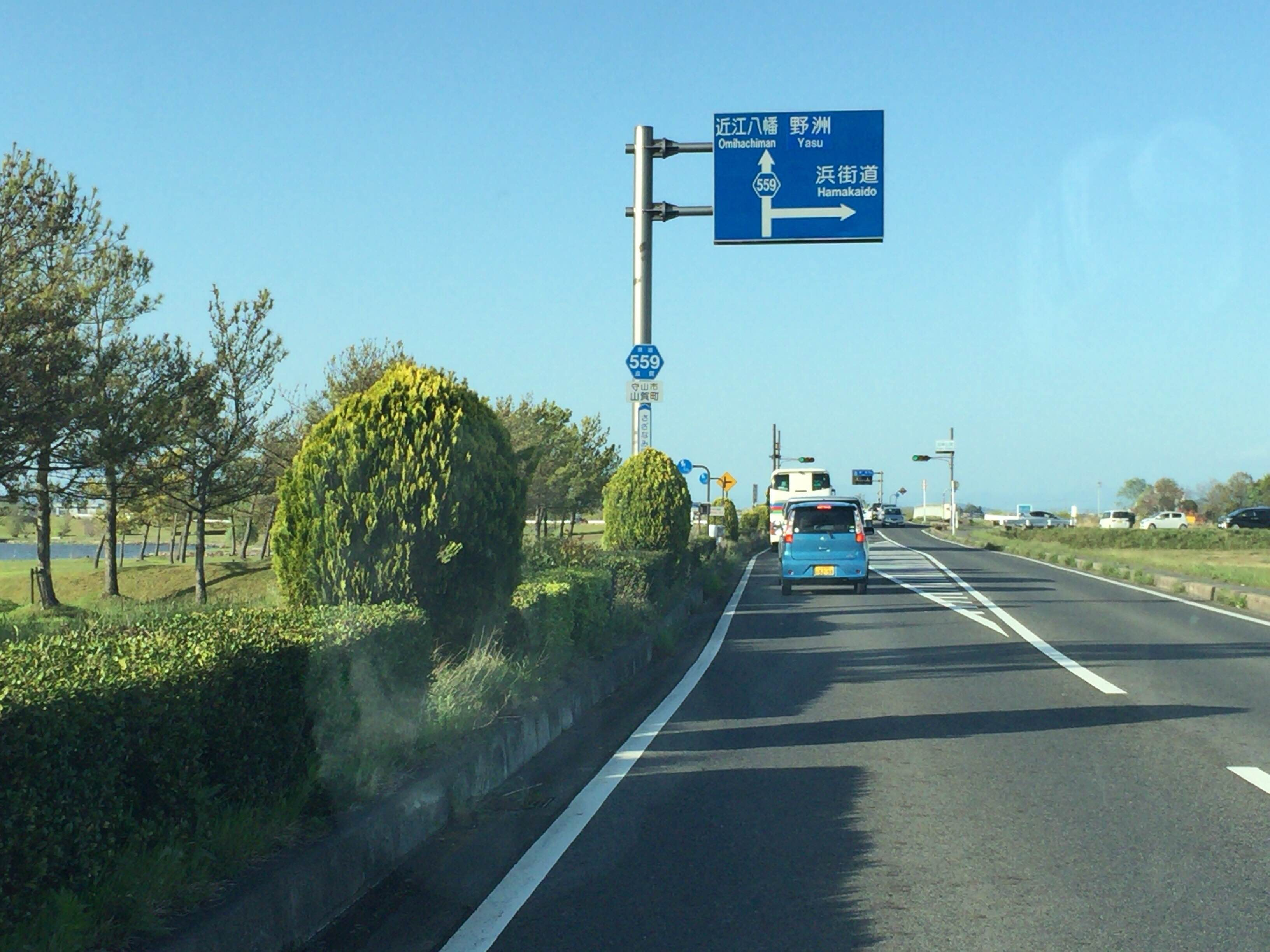 滋賀県道559号近江八幡大津線、守山市山賀町（やまがちょう）